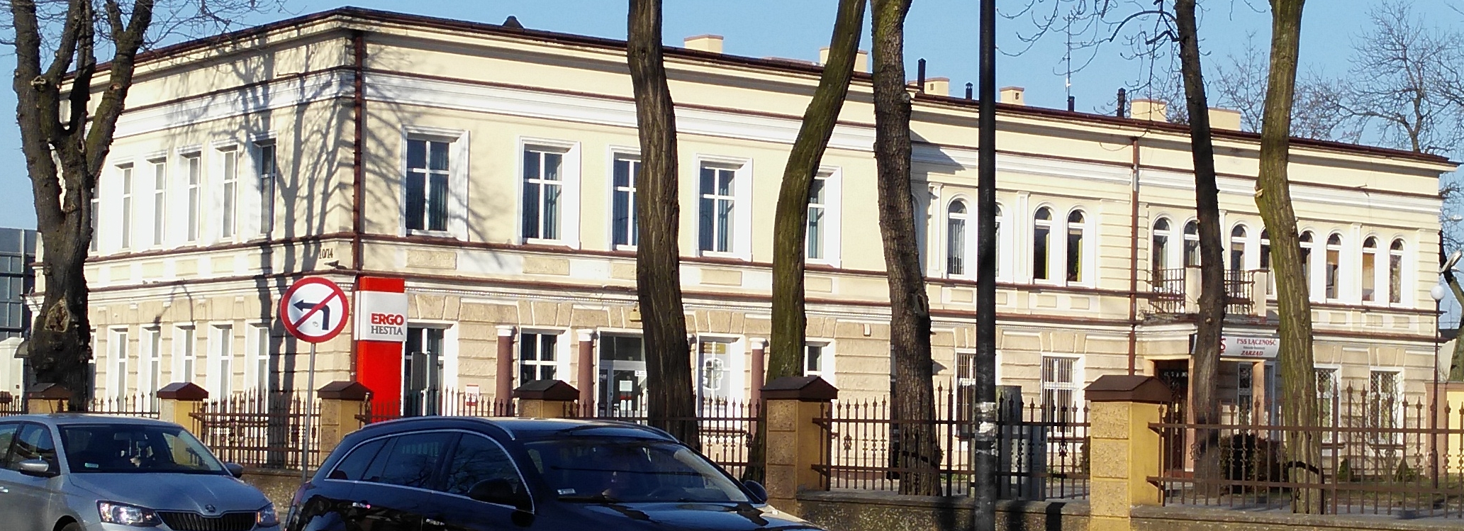 Willa Davida Bornsteina, jednego z czterech największych fabrykantów Tomaszowa a zarazem rabina miasta.